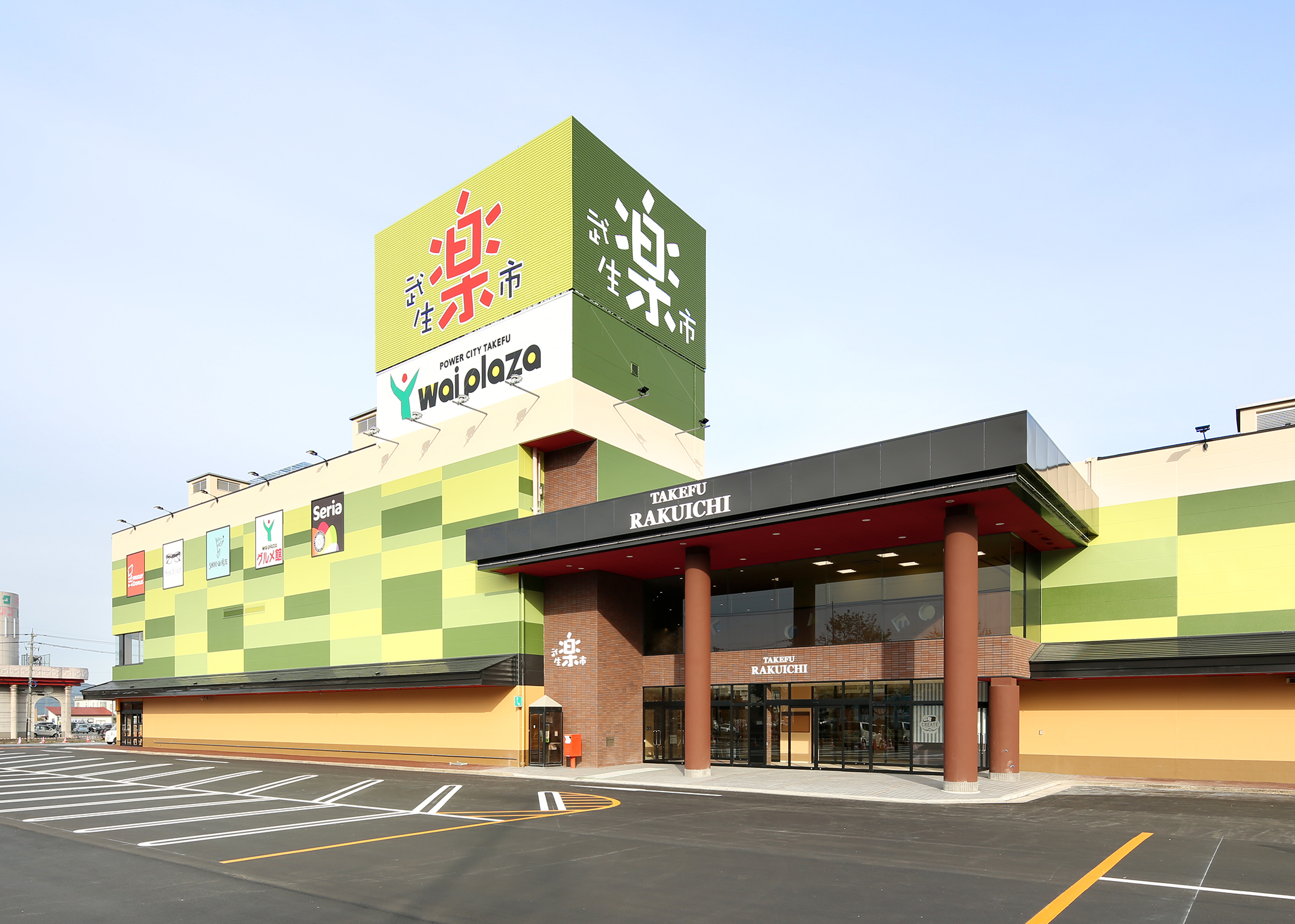 武生楽市外観2015年リニューアル後